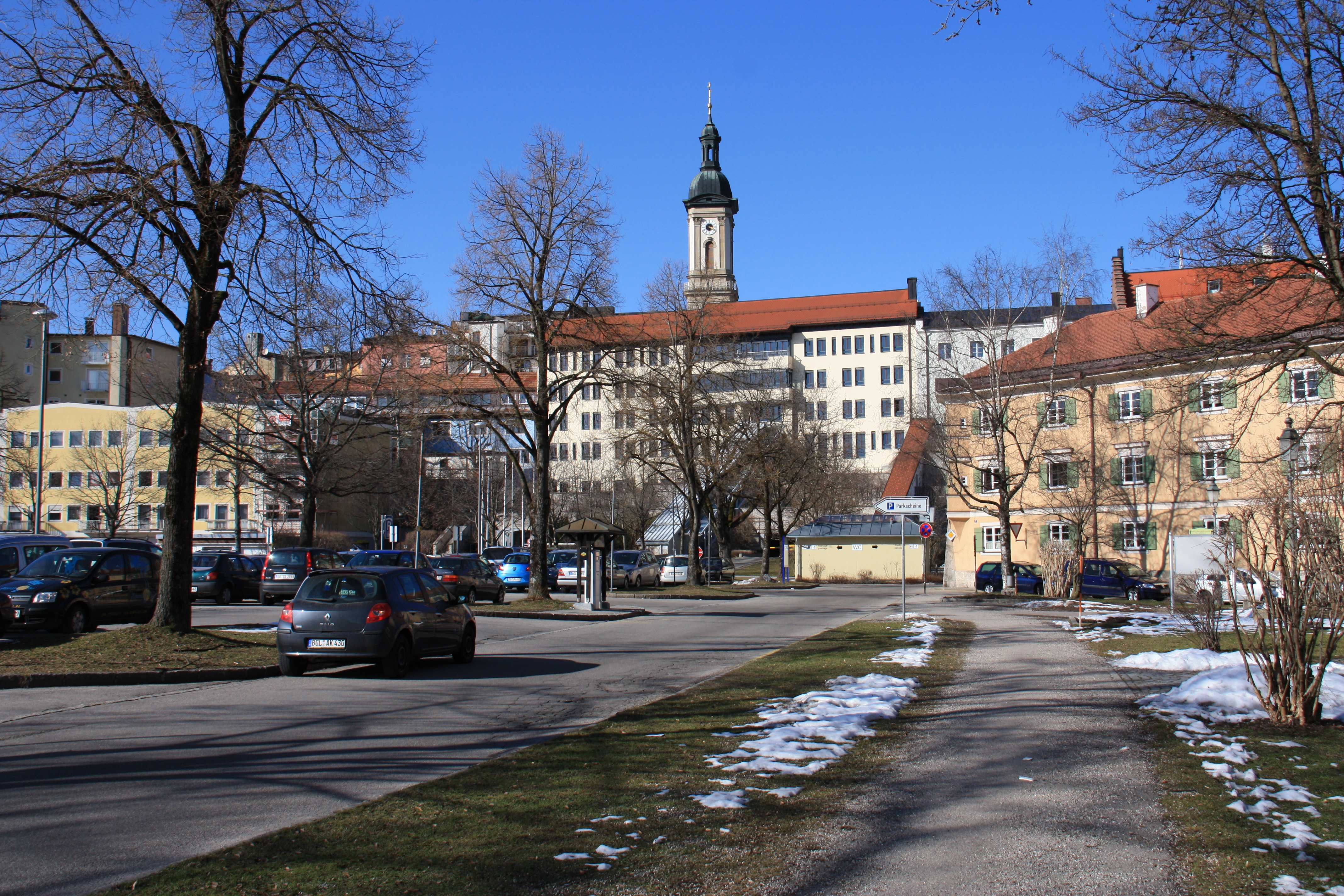 Blick auf die Traunsteiner Stadtmitte vom Karl-Theodor-Platz (Großparkplatz). In der Mitte des Bildes ist die Rückseite des Rathauses und der Turm der Pfarrkirche St. Oswald zu erkennen.